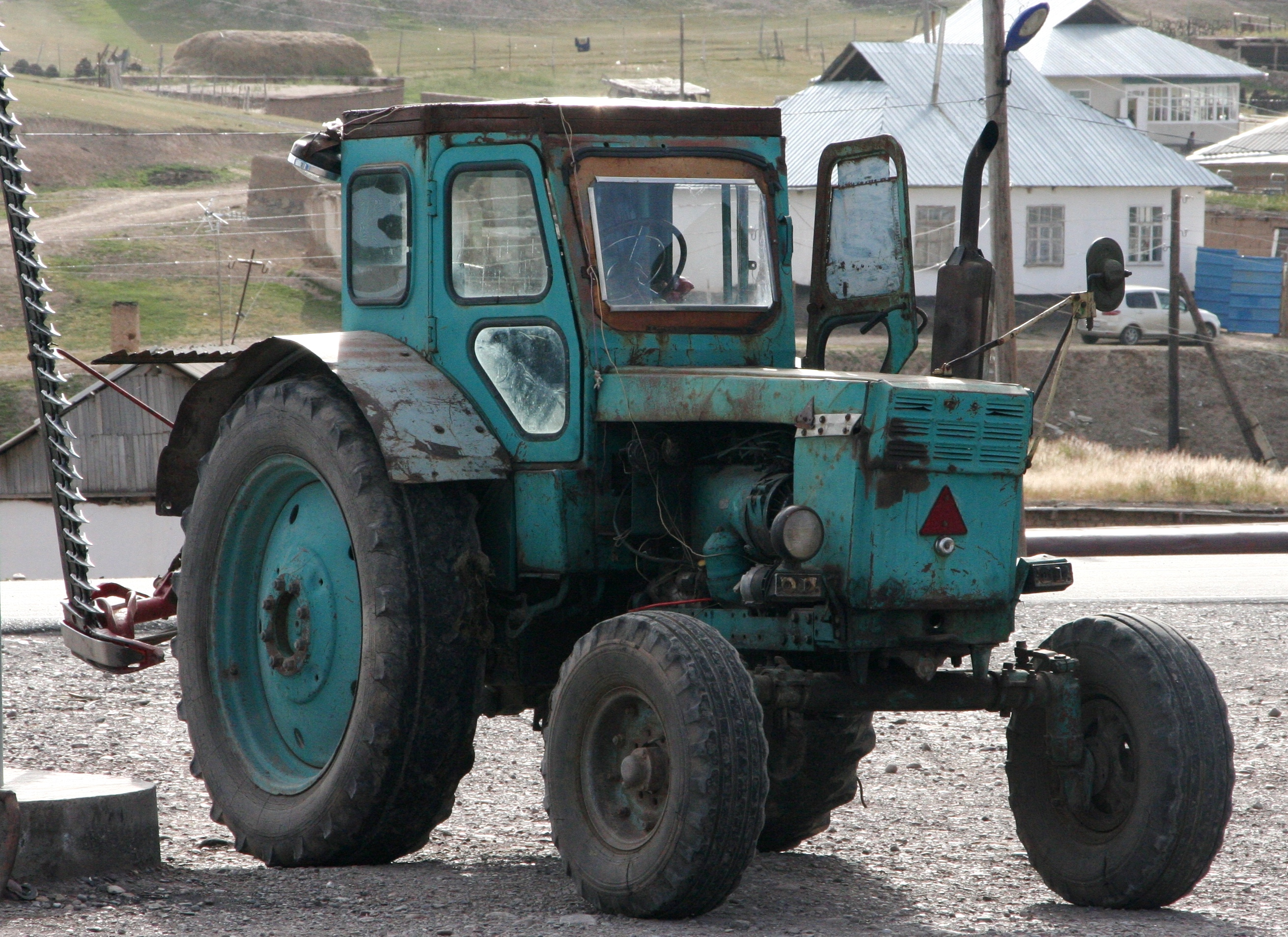 T-40 Traktor an einer Tankstelle im Alaital, Kirgisistan.